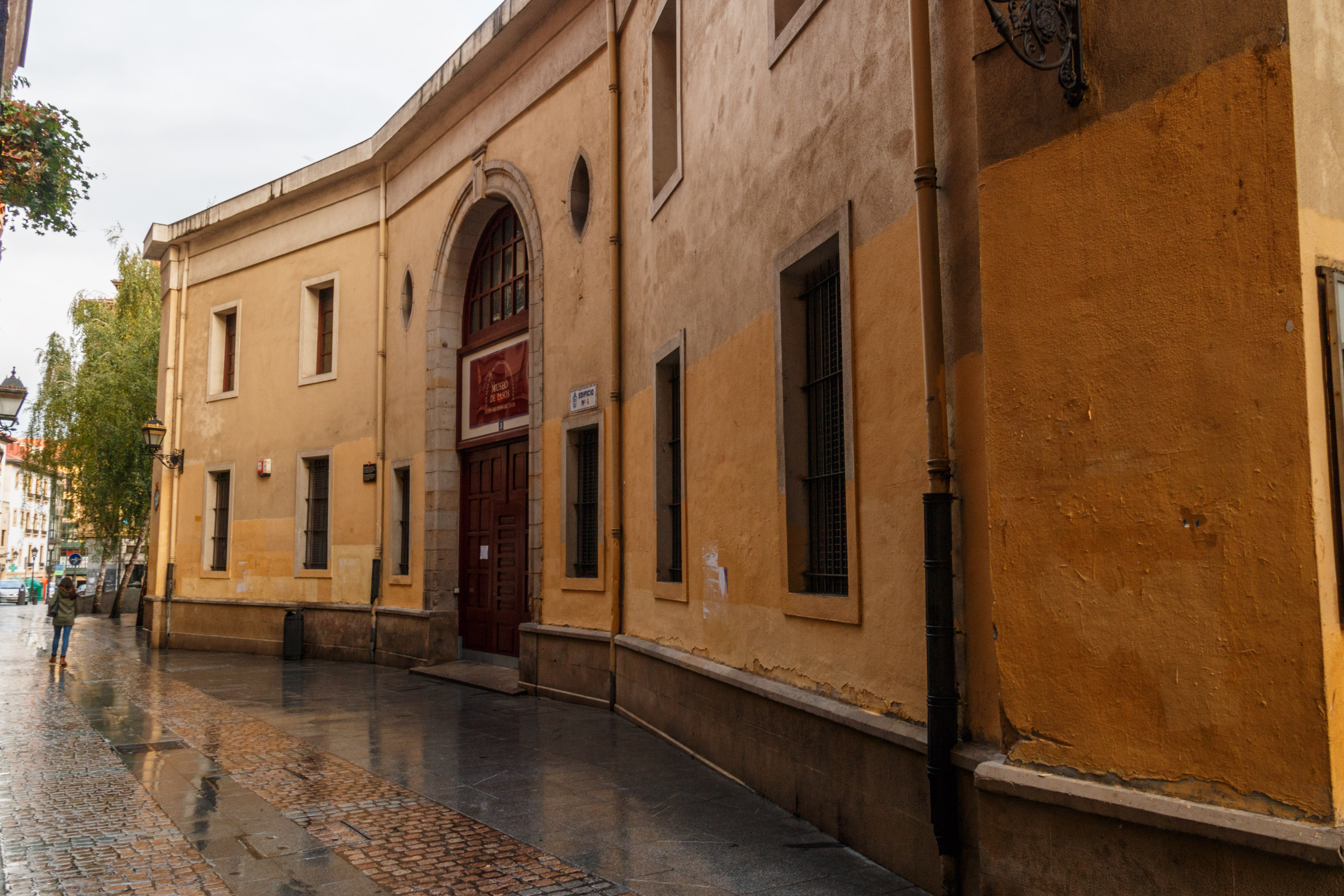 Iturribide, 3